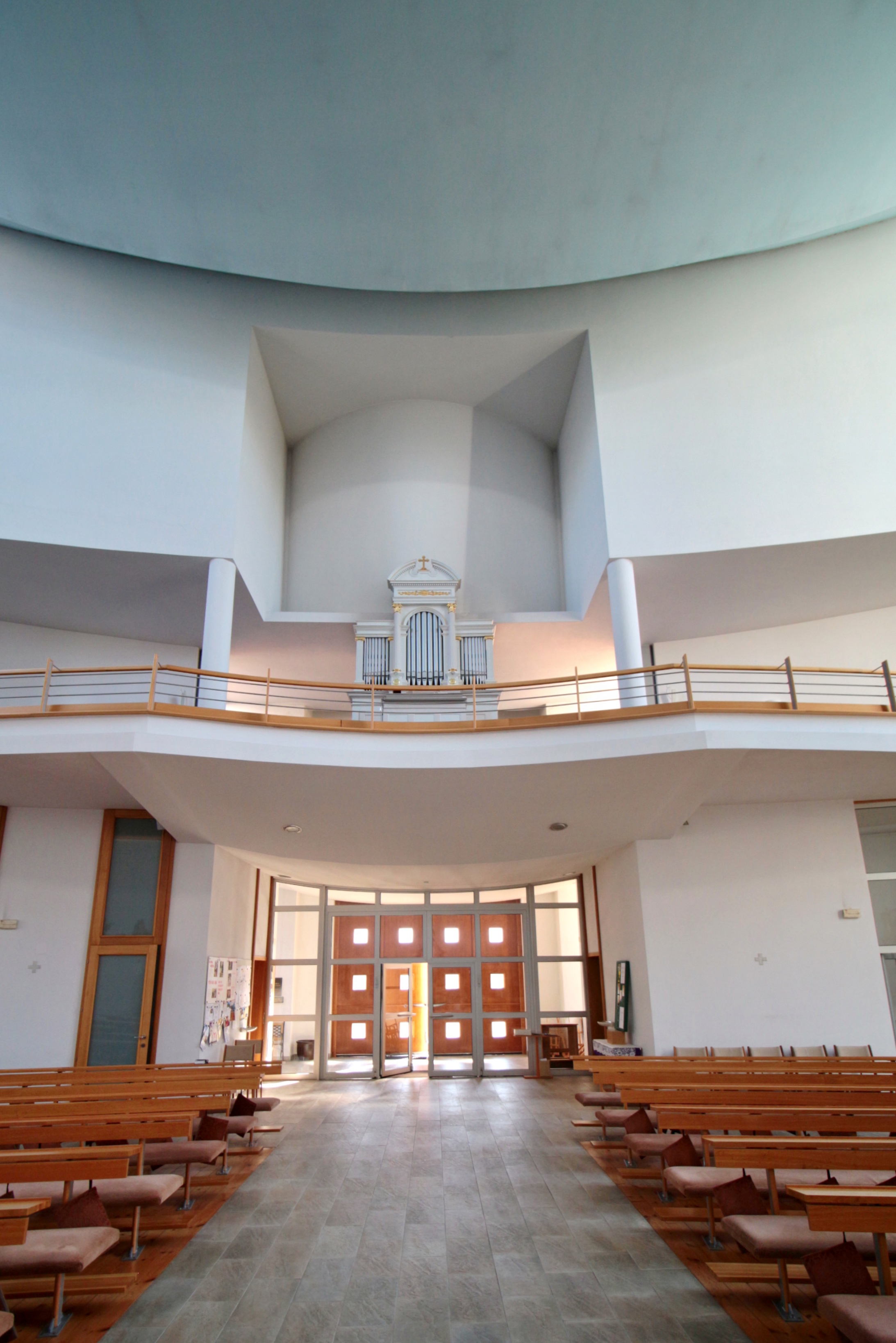 Moravský Žižkov, okres Hodonín, moderní kostel Panny Marie Vítězné